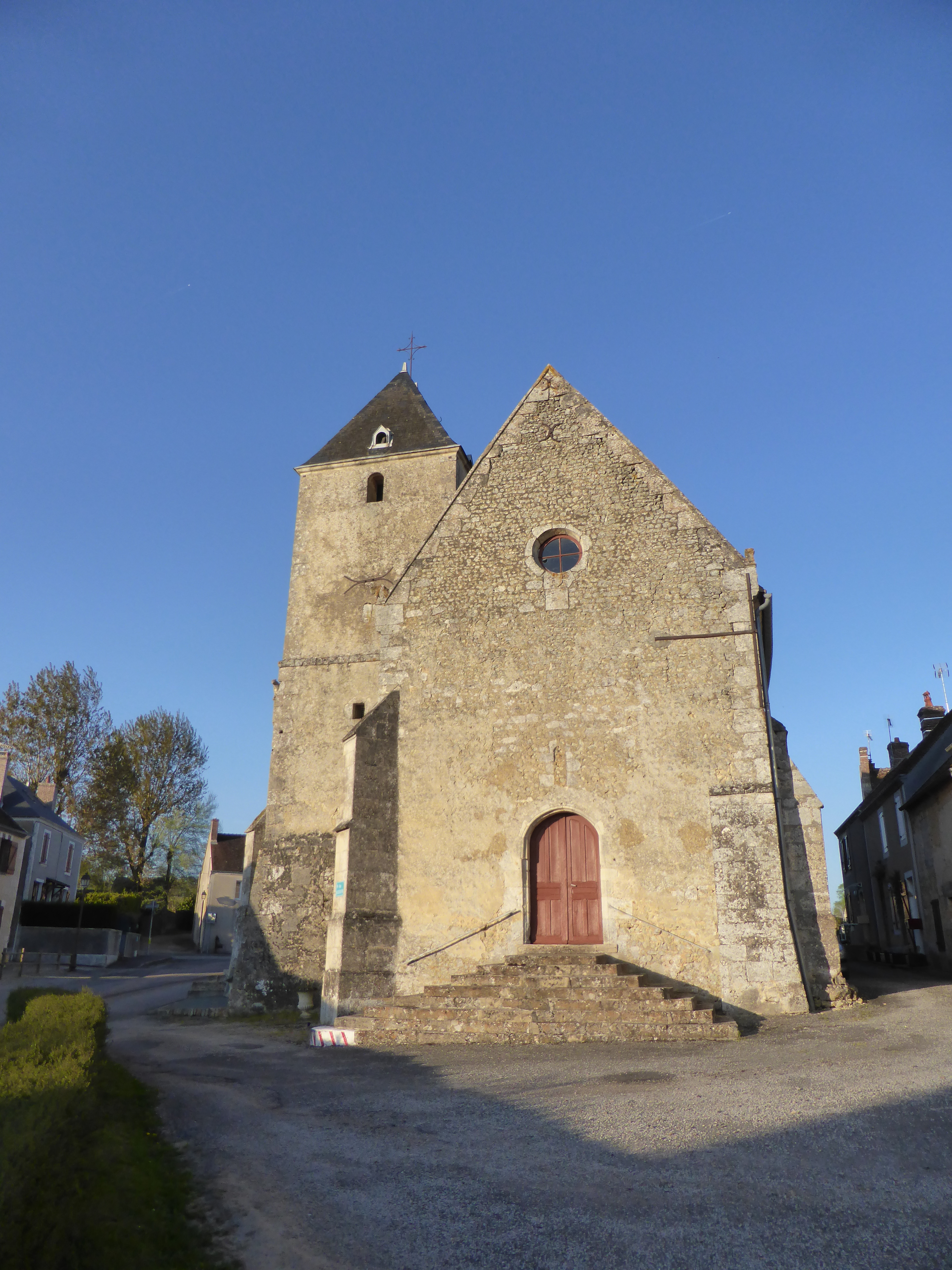 Église Saint-Pierre de La Chapelle-Souëf, dans l'Orne.